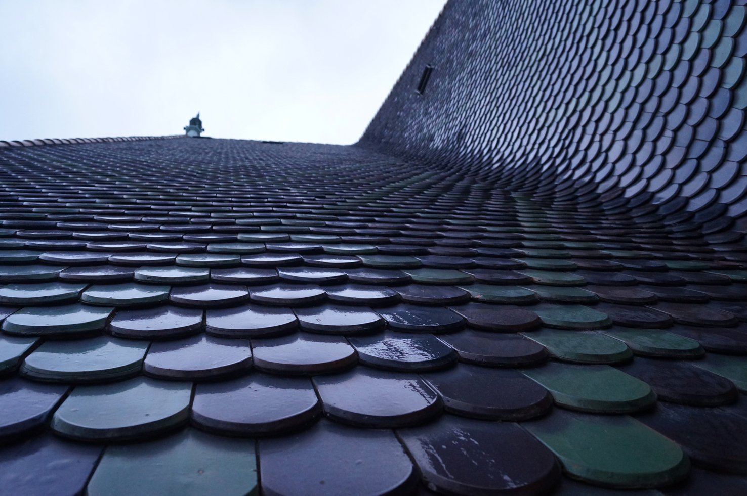 Ziegel Stephansdom (2012)